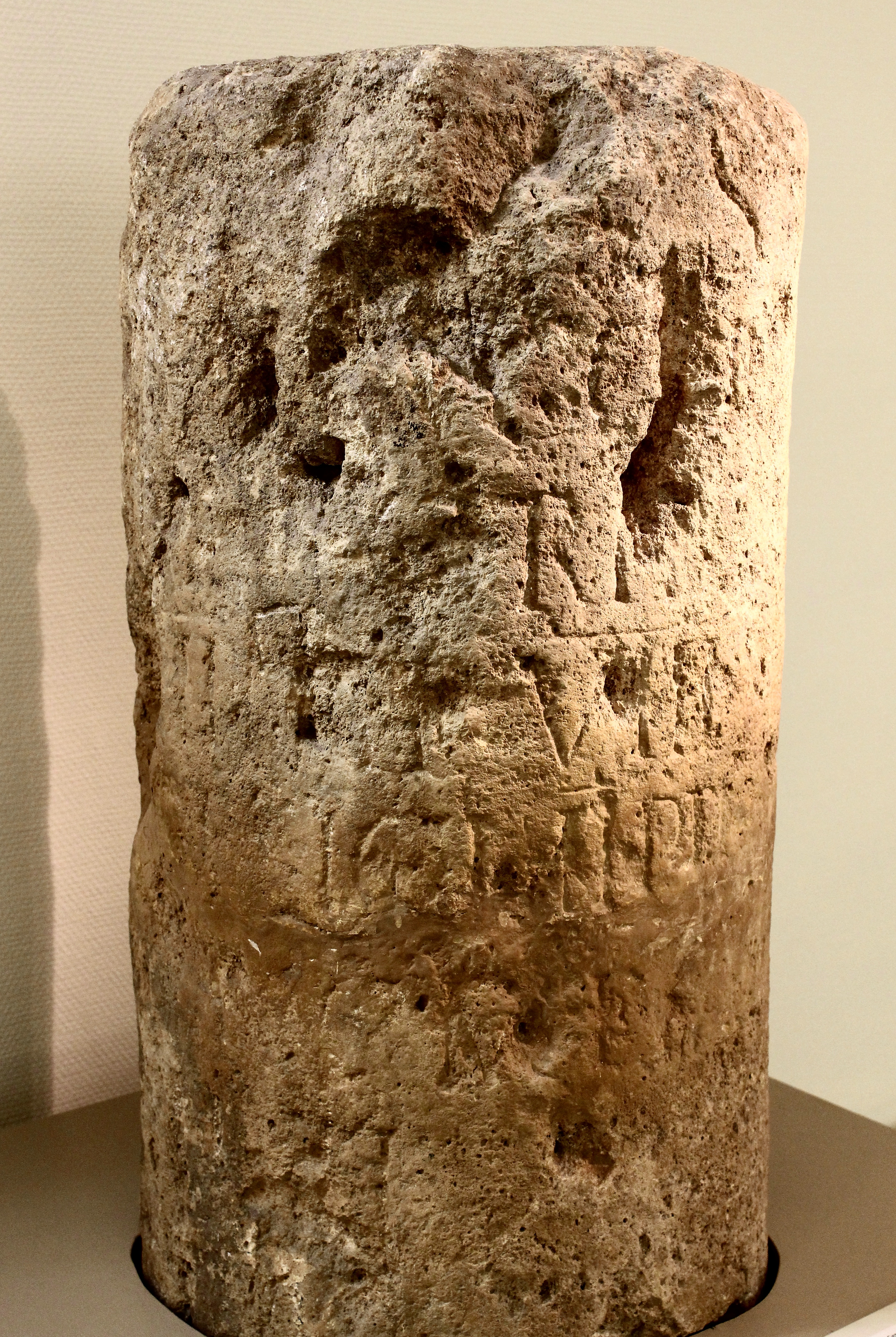 Borne miliaire de Buzenol, trouvée en 1913 dans les fortifications du Bas-Empire de Montauban à Buzenol (province de Luxembourg, Belgique), dites aussi du château des Quatre fils Aymon. Elle indiquerait peut-être la distance jusqu'à Trèves (54 milles), mais seul une partie des chiffres est lisible. Elle fut érigé en 44 apr. J.-C. sous l'empereur Claudeet est conservée aux Musées royaux d'Art et d'Histoire, Bruxelles, Belgique.CIL XVII2, 00549 = Finke 00320 = ILB 00136a (2 p 235) sur Epigraphik-Datenbank Clauss-Slaby.Cf. * Gerold Walser, CIL XVII-2, 1986, inscr. 549 p. 211 (partiellement en ligne).* Renard Marcel, « Les nouvelles découvertes de reliefs gallo-romains à Buzenol (Belgique) », dans Comptes-rendus des séances de l'Académie des inscriptions et belles-lettres 103e année, N. 1, 1959, p. 26 note 2 (en ligne).* Alfred de Loë, Musées royaux du cinquantenaire à Bruxelles. Belgique ancienne. Catalogue descriptif et raisonné. 1-4. 3, La période romaine, Bruxelles, Vromant, 1937, p. 51 et fig. 3.